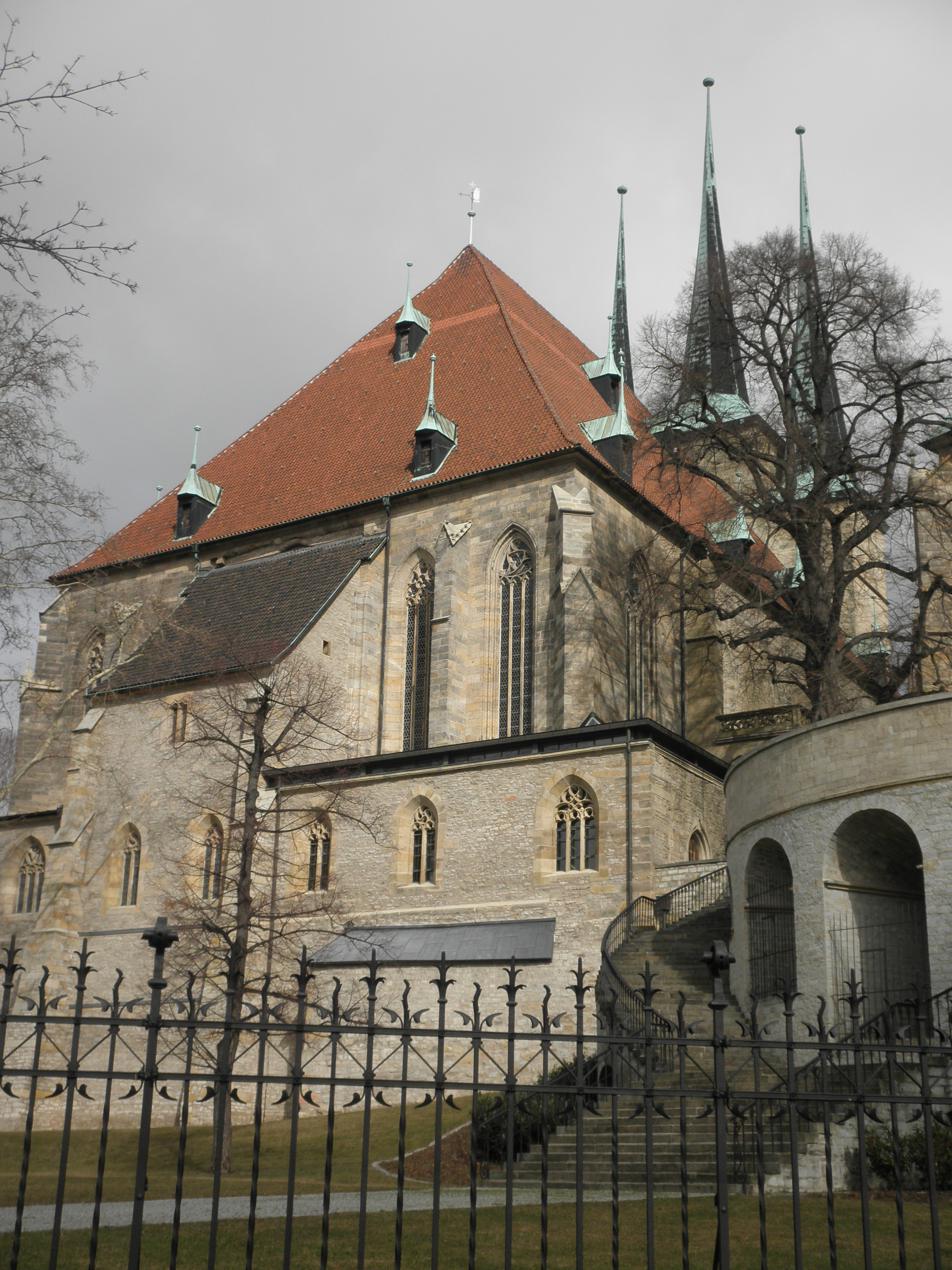 Severikirche